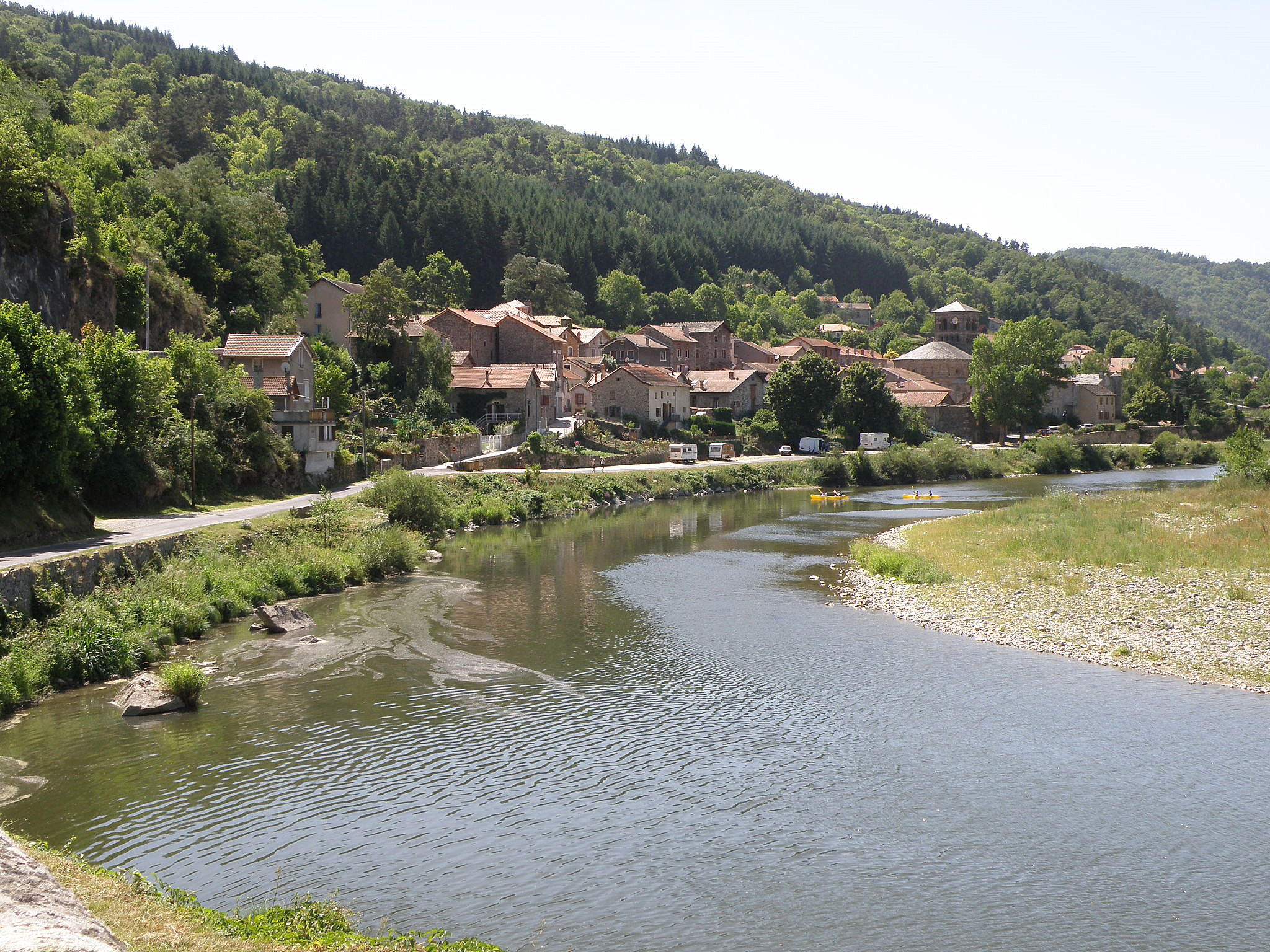 Chamalières-sur-Loire, comm. du départ. de la Haute-Loire, France (région Auvergne). Vue générale du bourg-centre depuis le pont sur la Loire. Coup d'oeil vers l'ouest-sud-ouest.